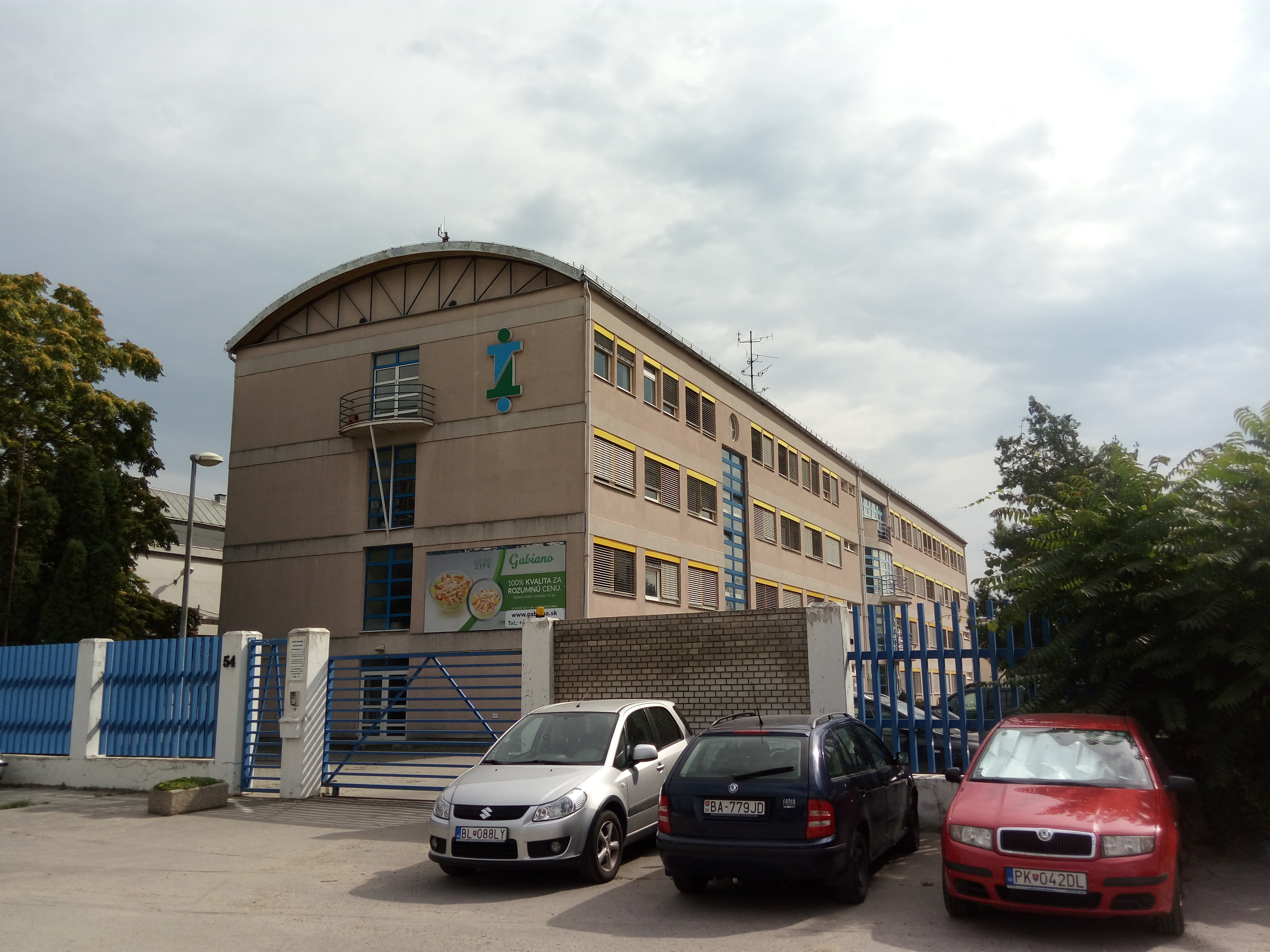 Mlynské nivy 54, Ružinov, Bratislava